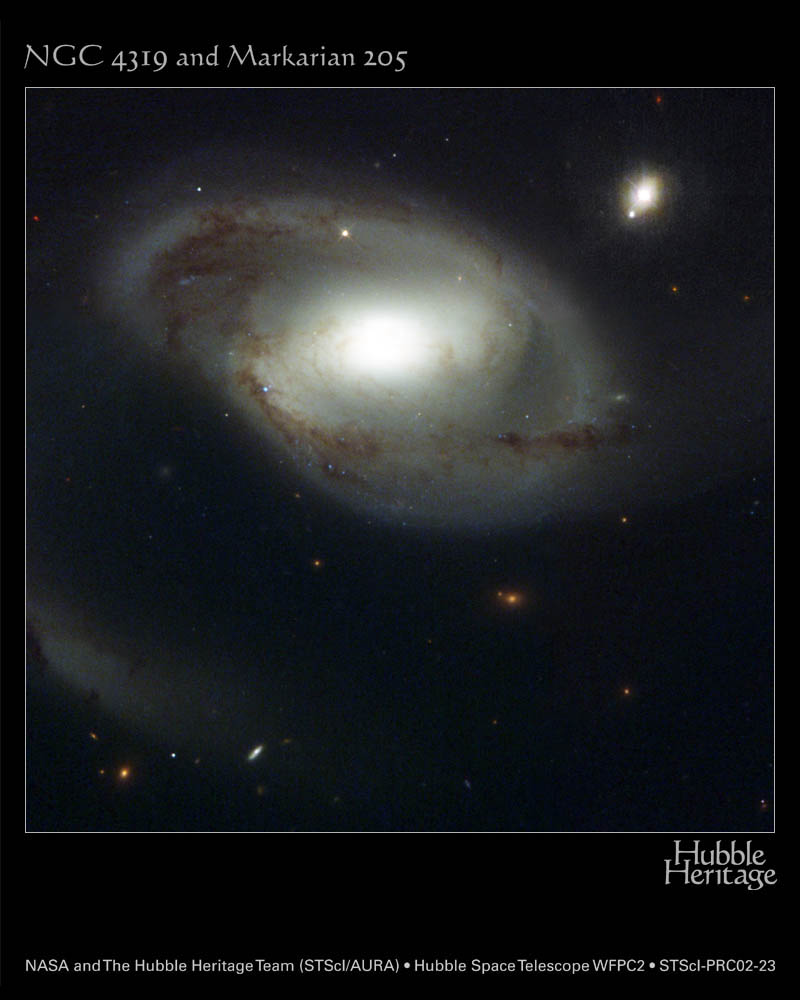 NGC 4319